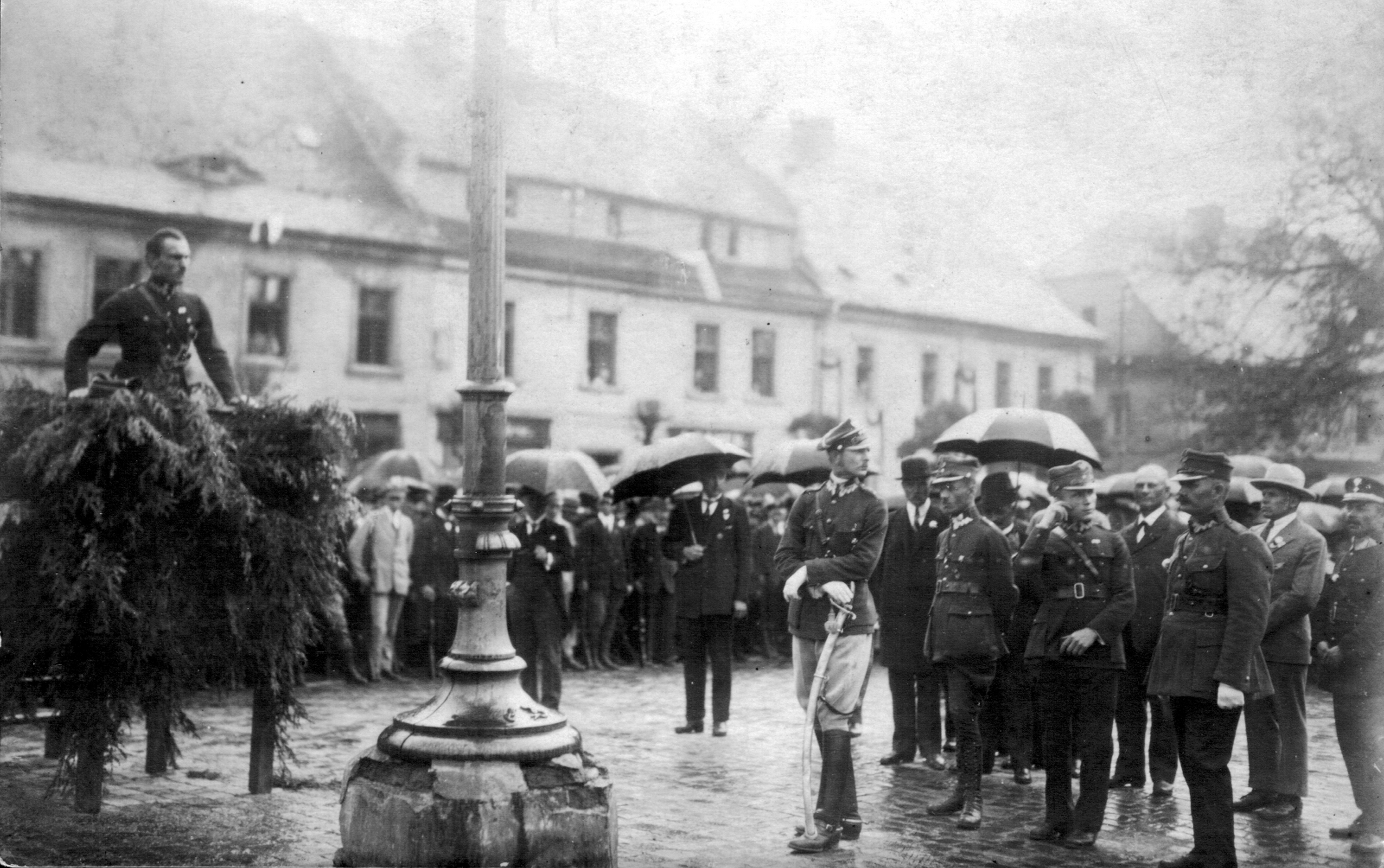 Pszczyna, Rynek, czerwiec 1922. Podporucznik Stanisław Krzyżowski przemawia z trybuny podczas uroczystości powrotu ziemi pszczyńskiej do Polski